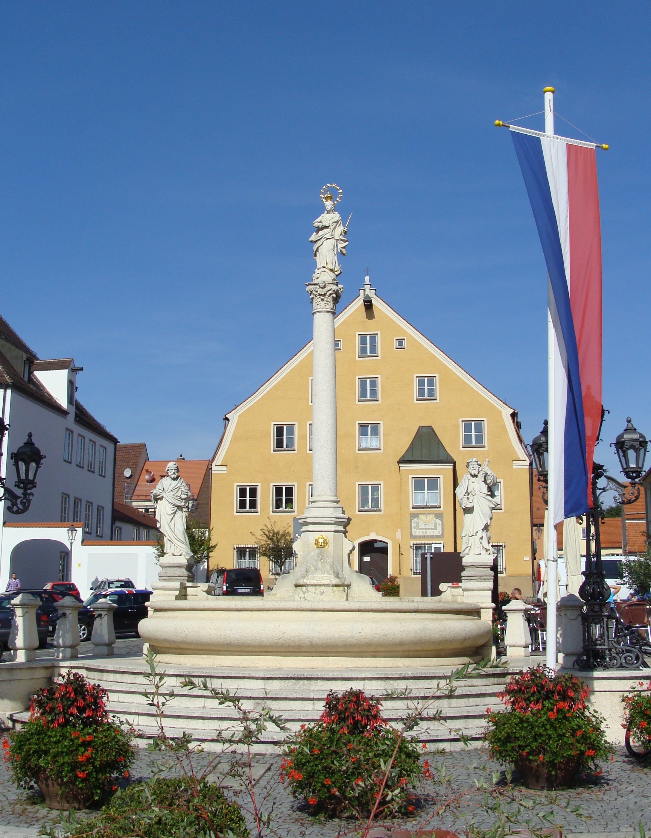 MarienbrunnenThis is a photograph of an architectural monument.